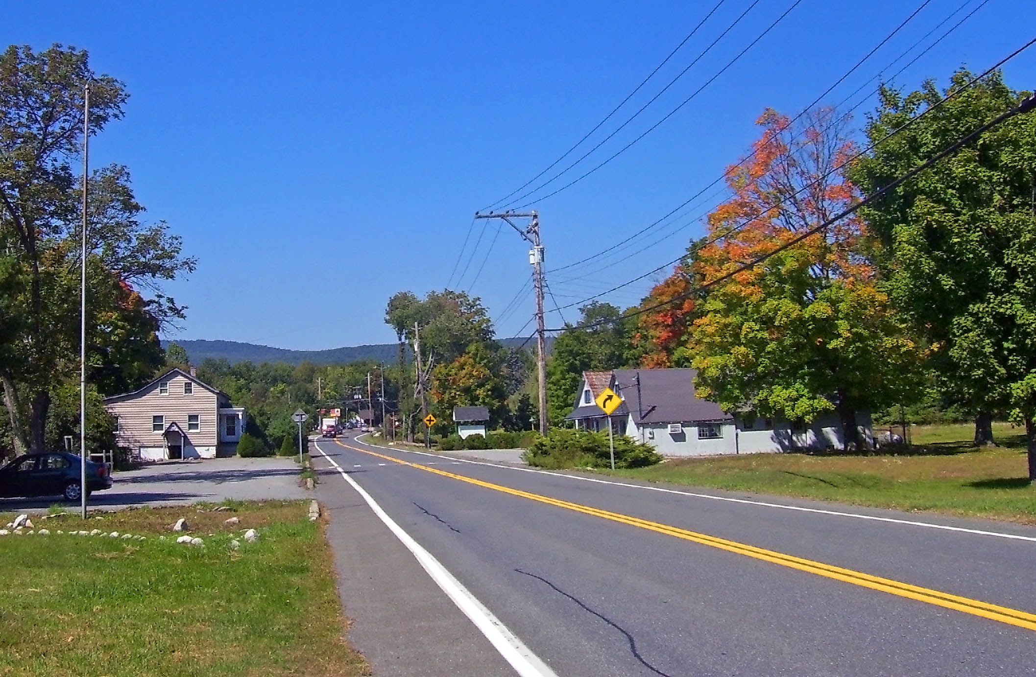 Walker Valley, NY, USA